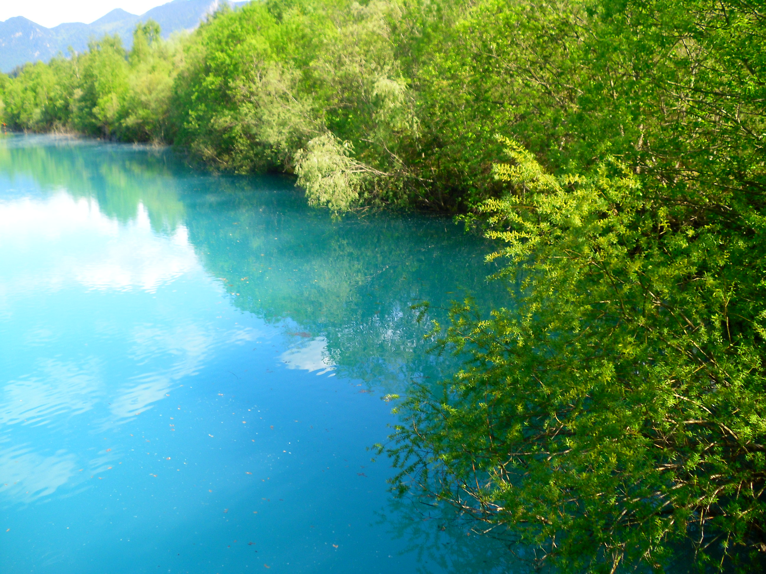 Laichbereite Fische aus der Familie der Karpenartigen versammeln sich Ende Mai 2016 nahe der Wasseroberfläche. Die Abbildung zeigt eine Stellen am westlichen Ende der ehemaligen Abbaugrube.